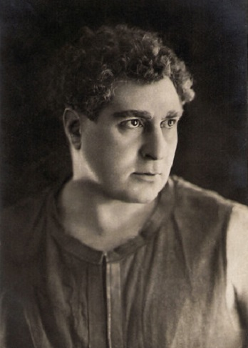 Bruto Castellani nel film Quo Vadis?